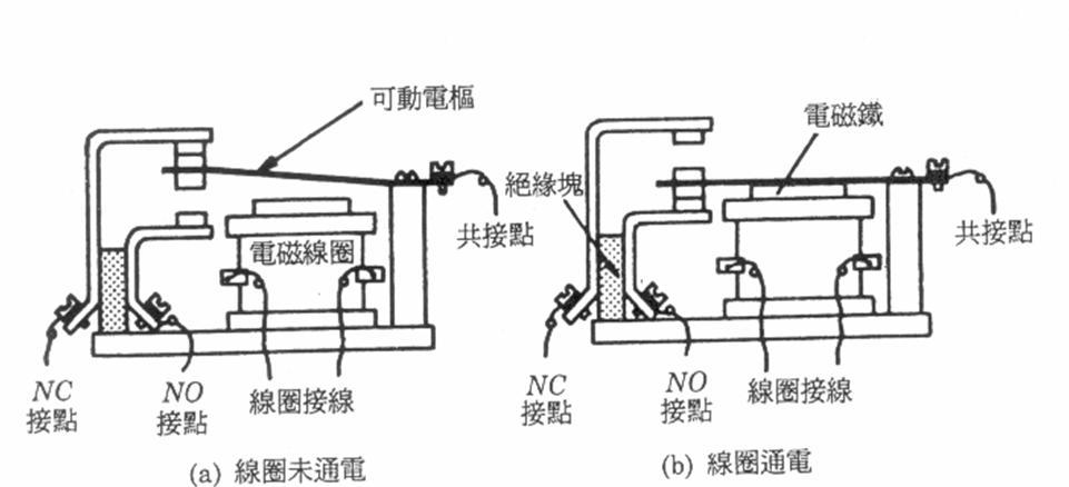 Relay內部構造